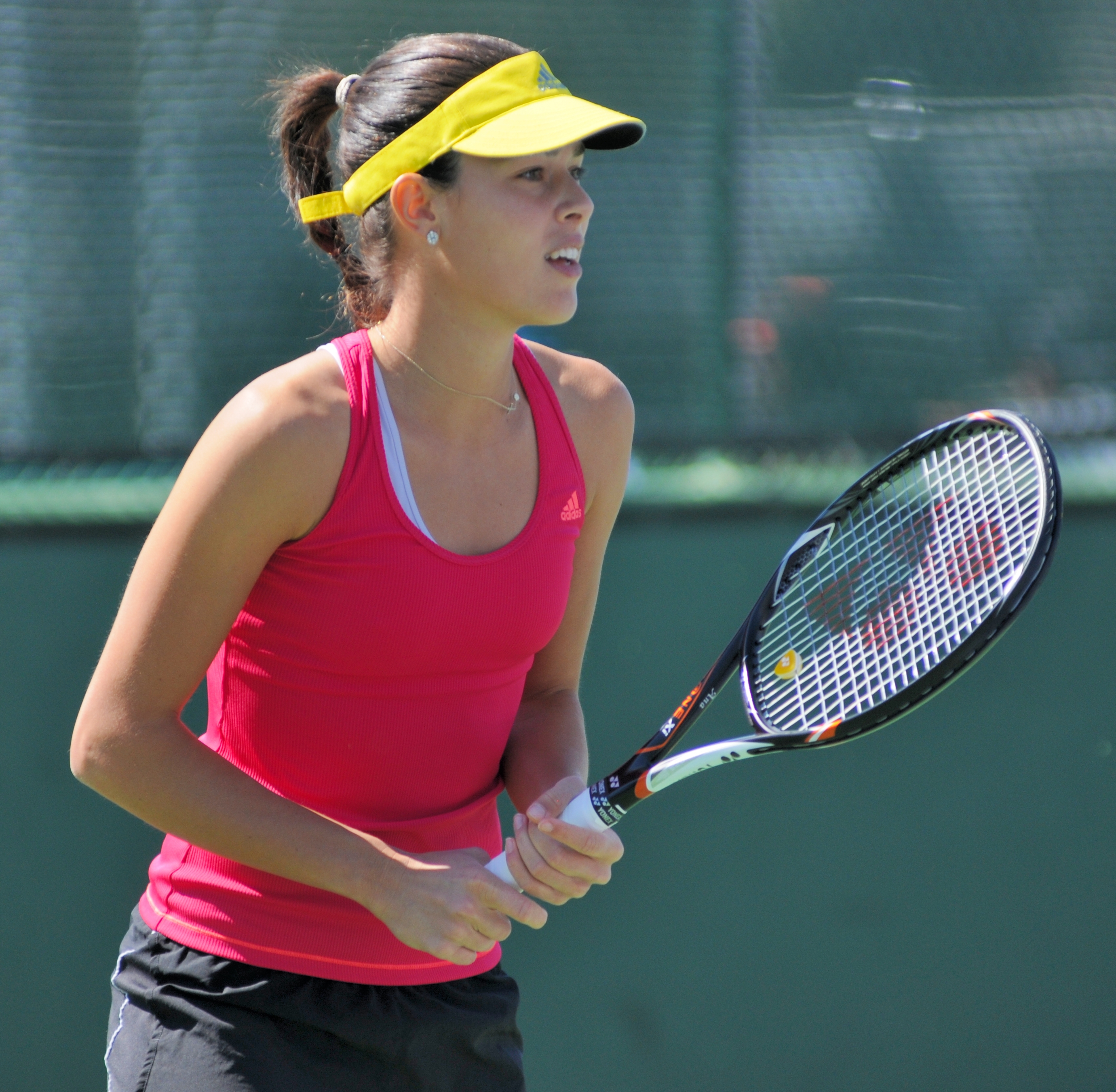 2013 BNP Paribas Open